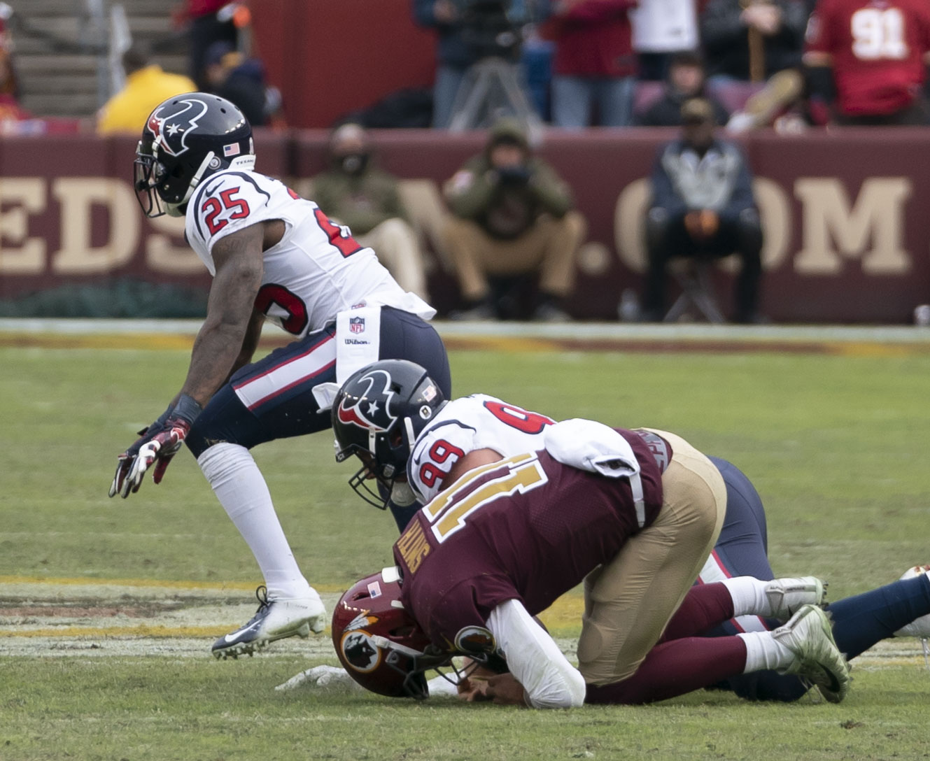 Texans at Redskins 11/18/18